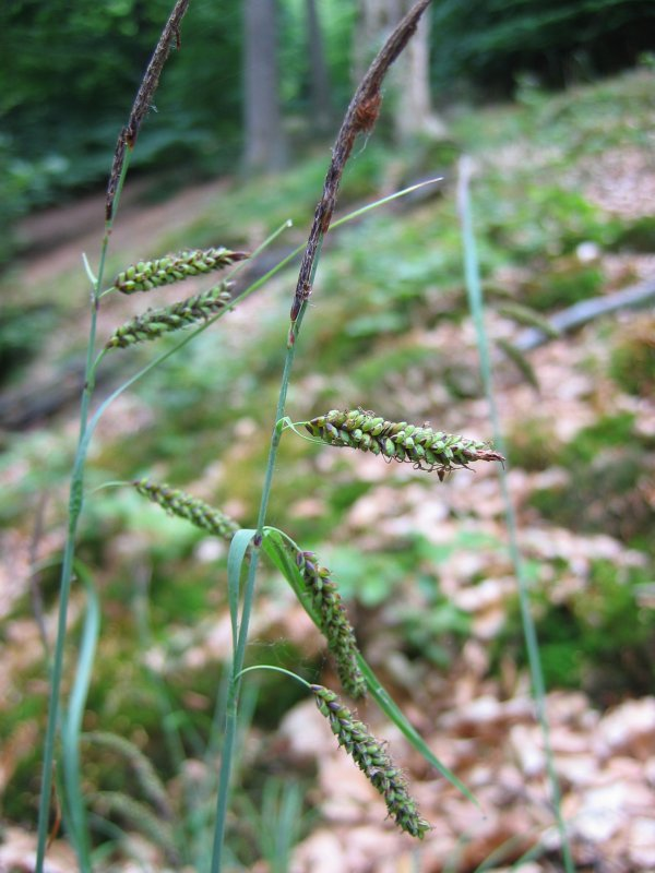 Blaugrüne Segge Carex flacca, Gliensee, Mecklenburg-Vorpommern